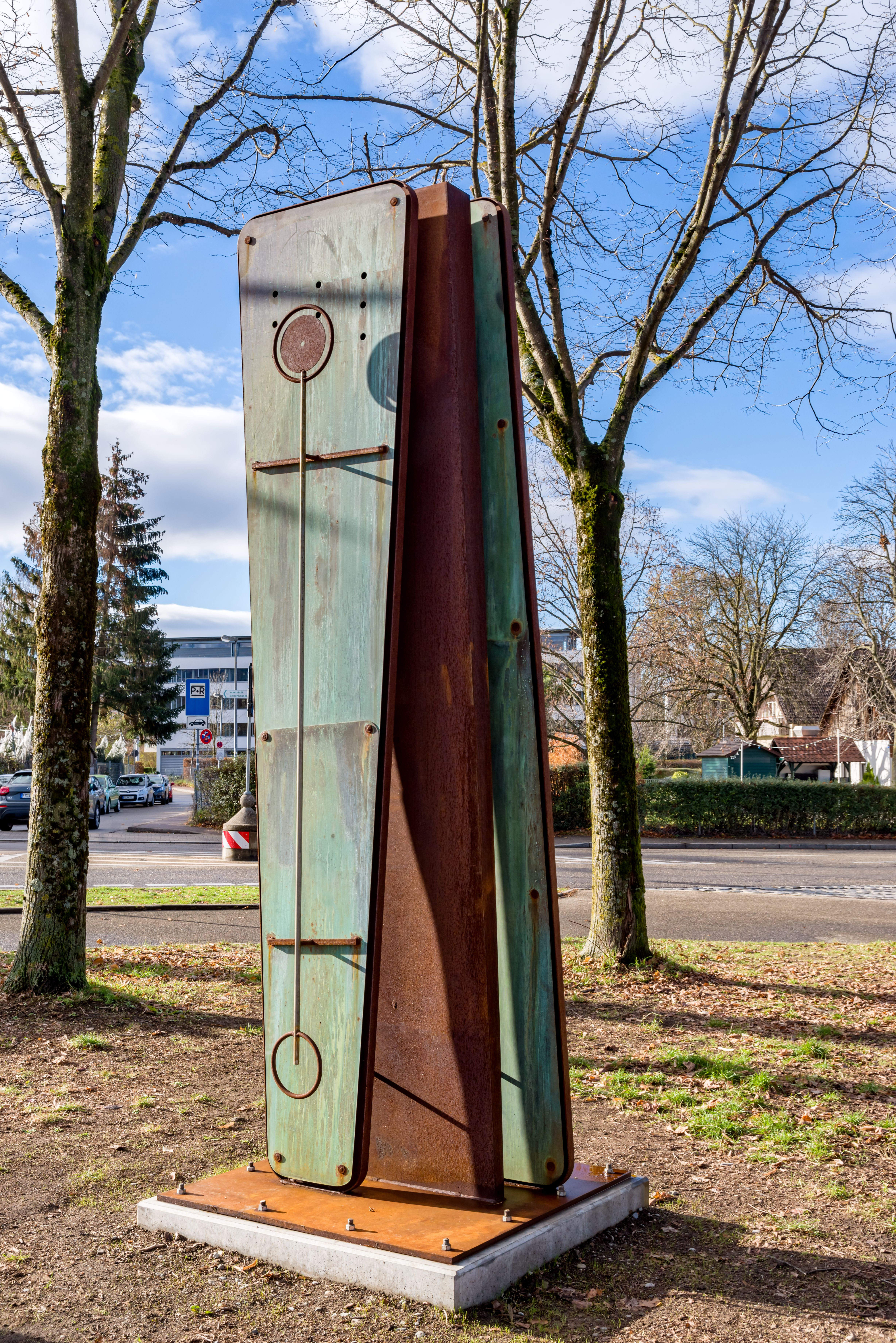 Die "Stele der Umarmung" ("La stele dell’ abbraccio") das italienischen Künstlers Antonio Ievolella in Freiburg Lehen an der Paduaallee Sie besteht aus Cortenstahl und Kupfer, das sind Materialien die sich durch die Umwelteinflüße ständig ändern eingeweiht wurde sie am 10.11.2018